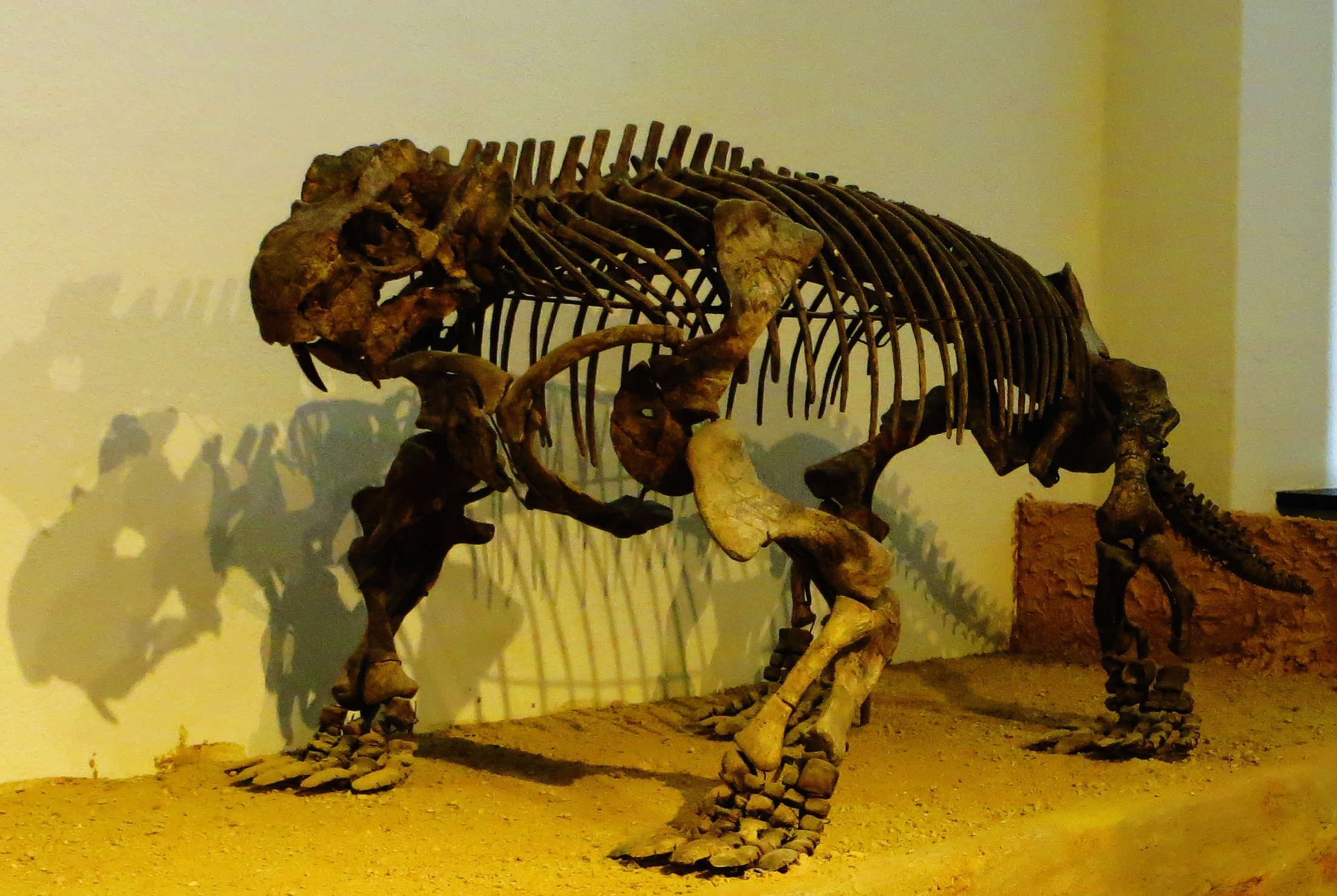 Fossil of Tetragonias, an extinct therapsid - Took the picture at Museum of Paleontology, Tuebingen